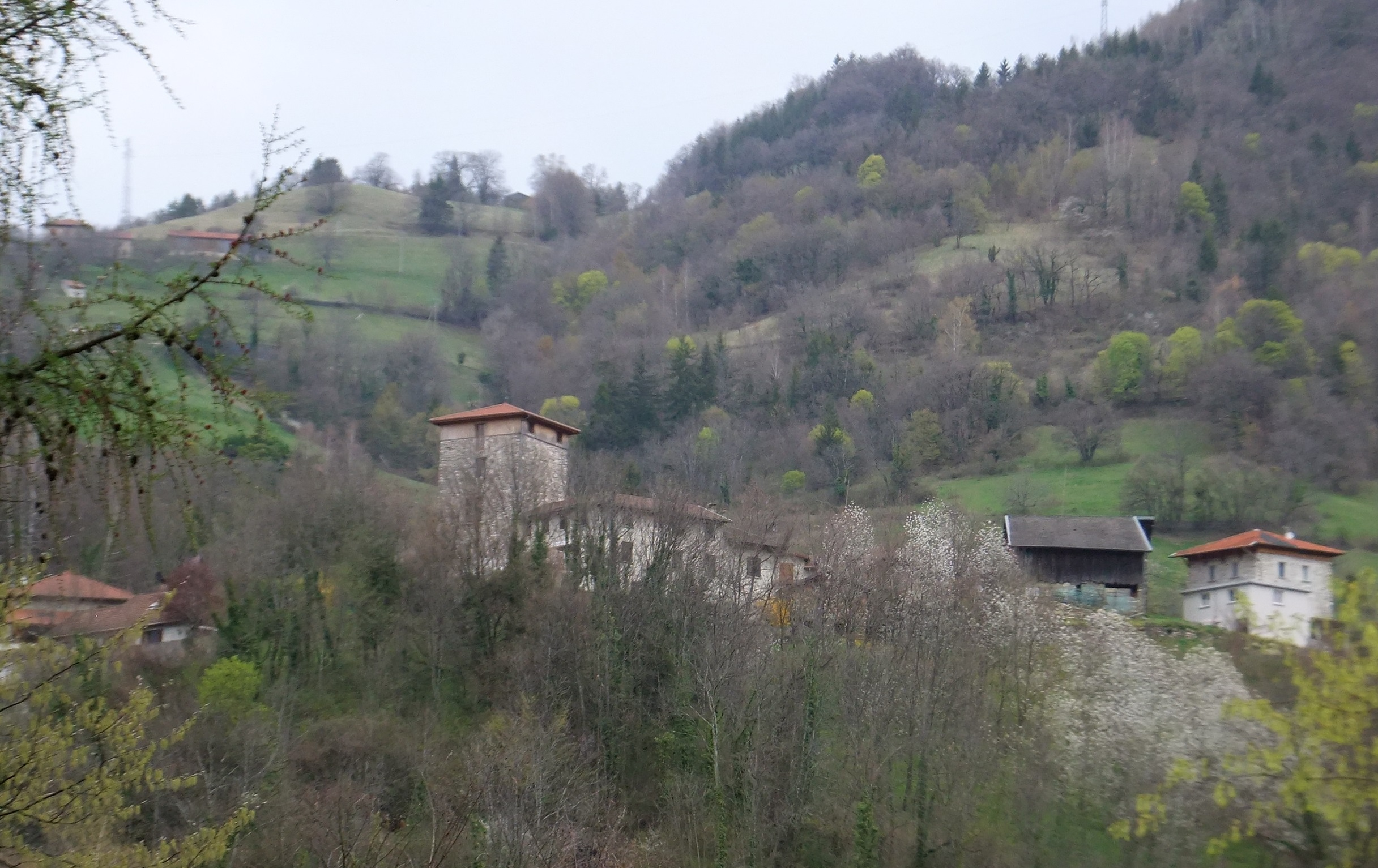 Vue du hameau de Mailles, depuis les gorges du Fay, dominé par la tour carré, vestige de la maison forte des seigneurs de Mailles, une des trois grandes familles du mandement de Moretel au Moyen âge.